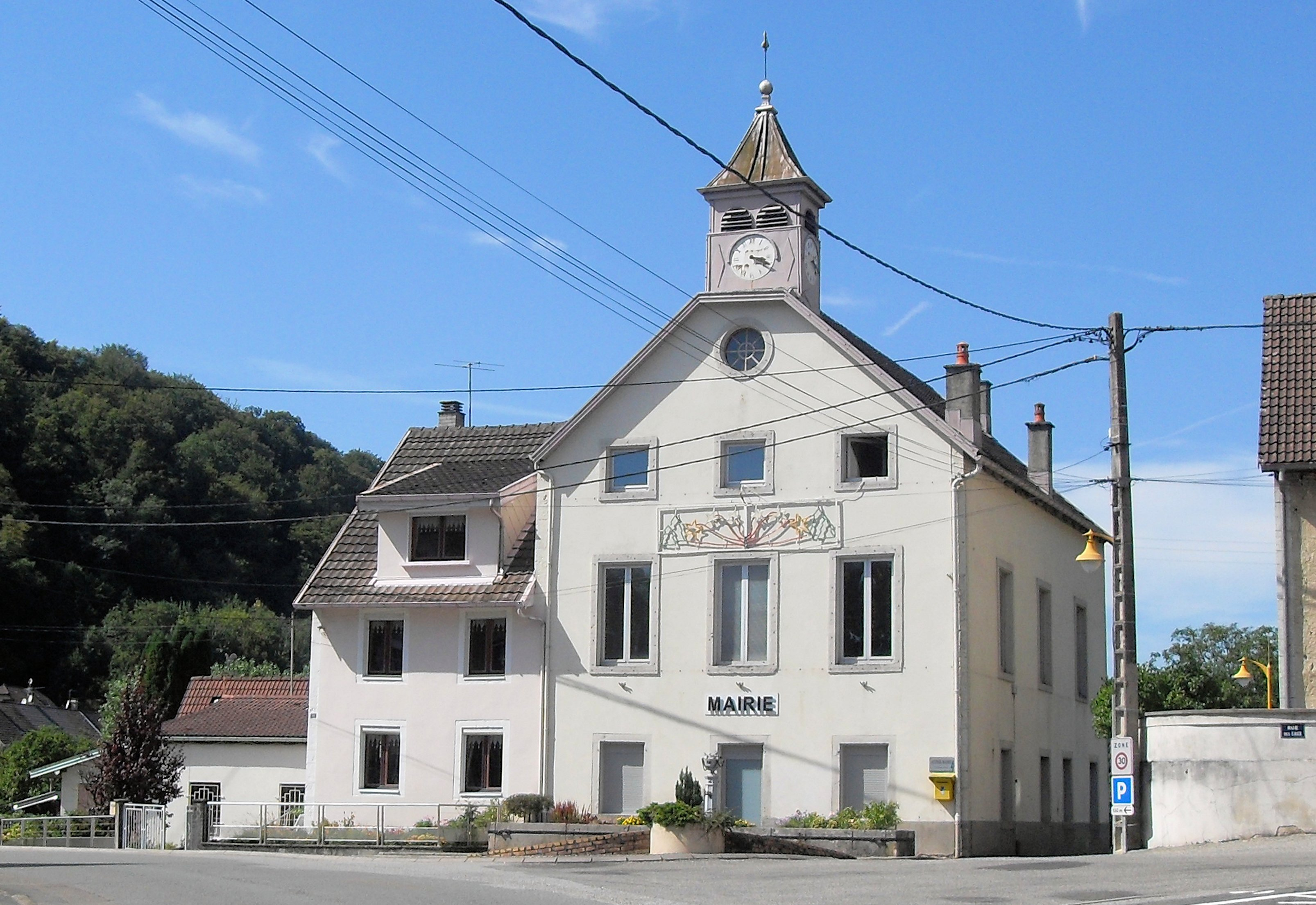 La mairie de Meslières